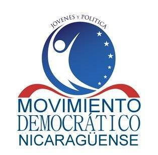 Logo Del Movimiento Democratico ,Representa La nueva generacion Politica Nicaraguense